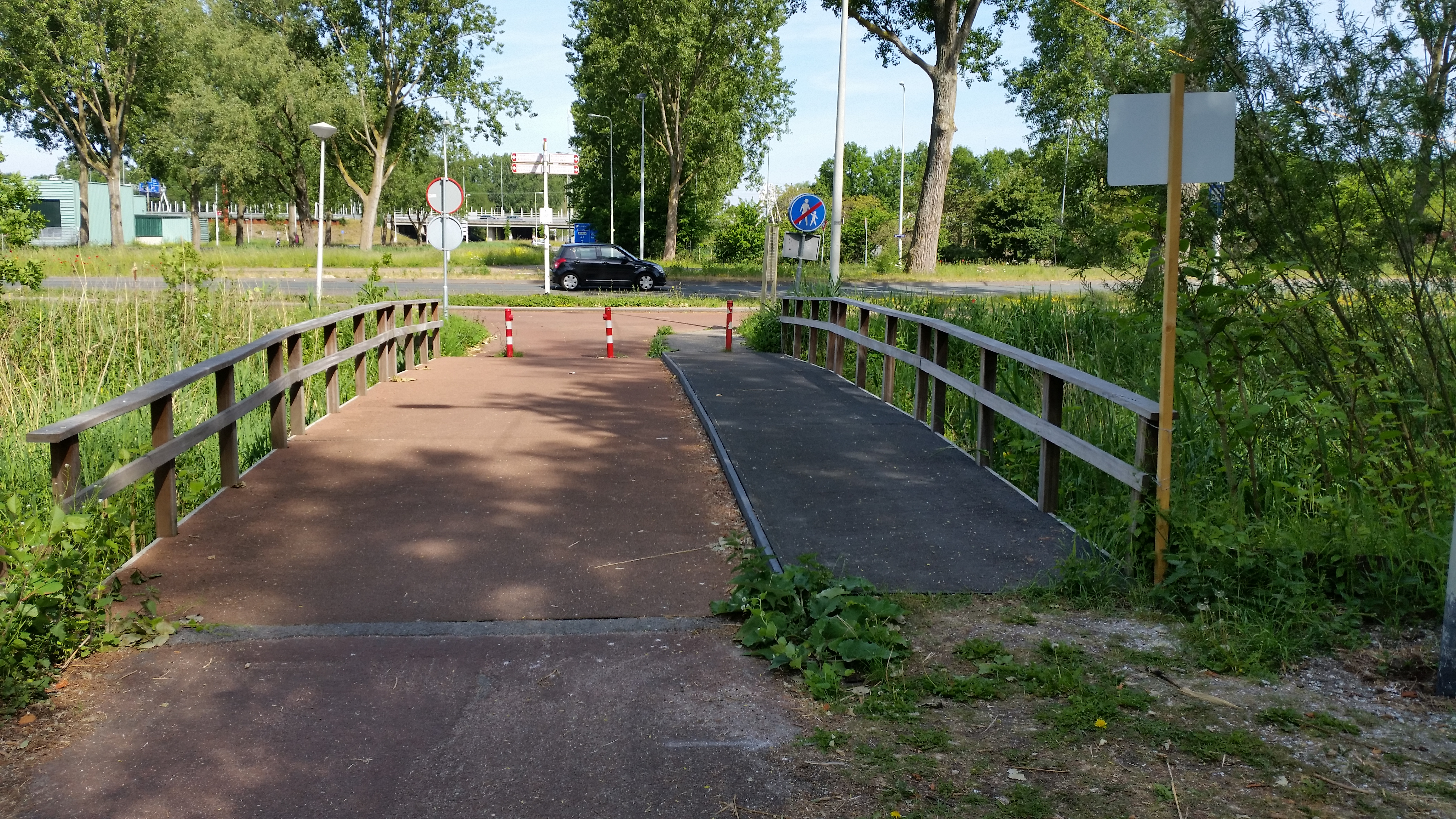 Impressie van Brug 1896 tussen Oude Haagseweg en De Oeverlanden, Amsterdam Nieuw-West